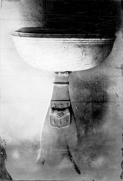 Taufbeckenbecken in der Kirche Saint-Rémi in Pierrefitte-sur-Loire